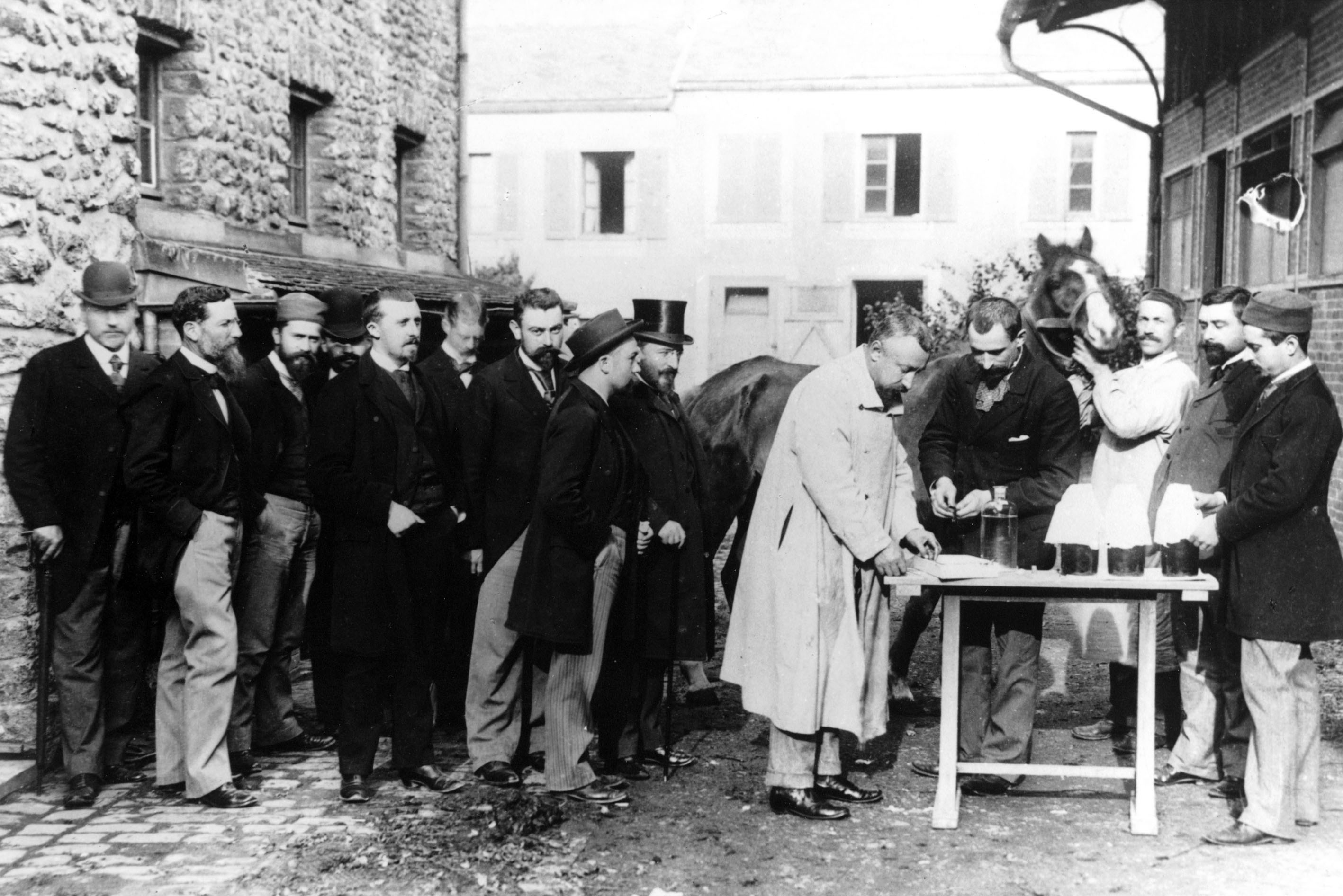 Edmond Nocard, professeur de pathologie infectieuse à l'École vétérinaire d'Alfort, savant pasteurien